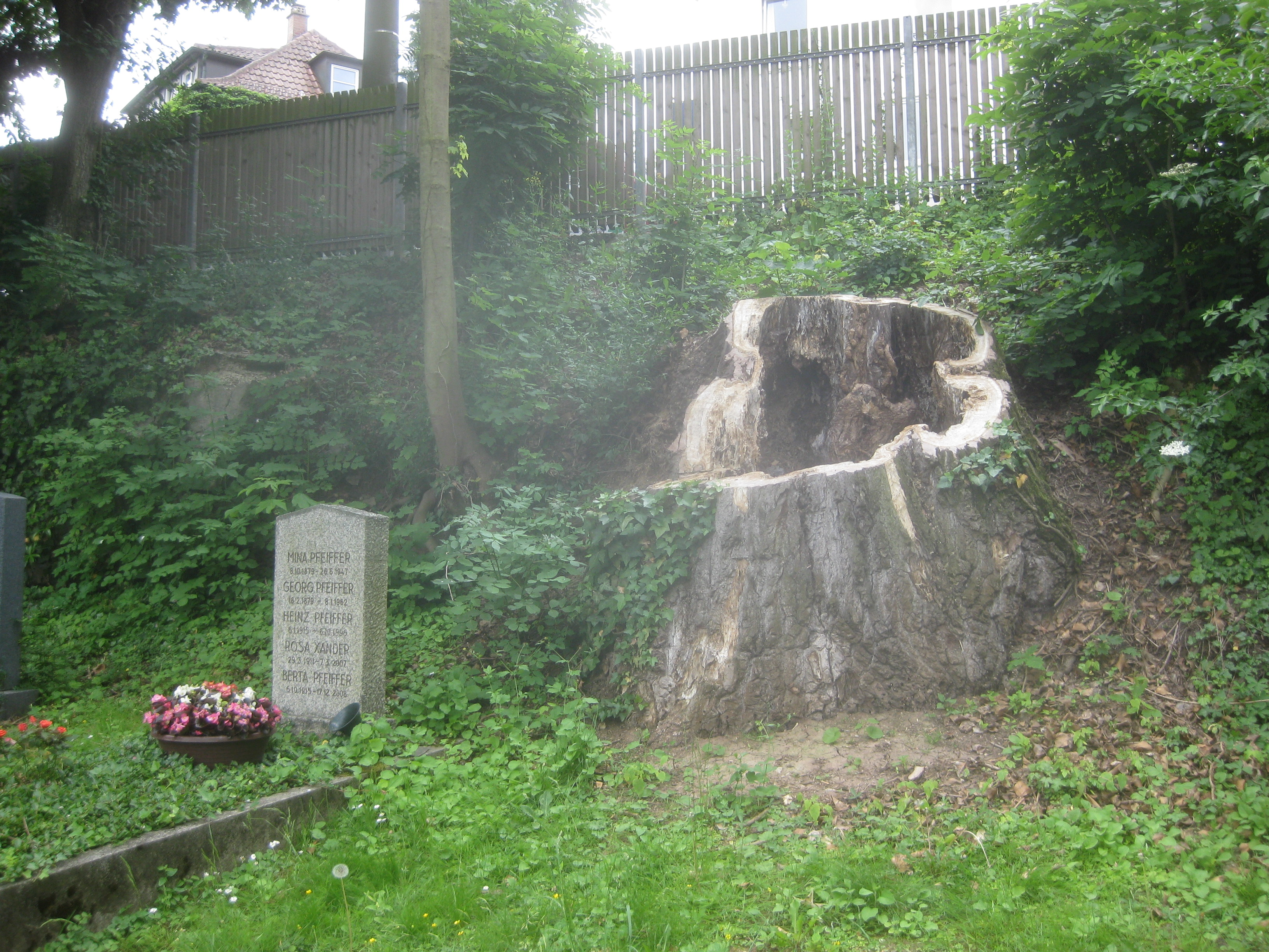 Friedhof Heslach, gefällter Baumriese.